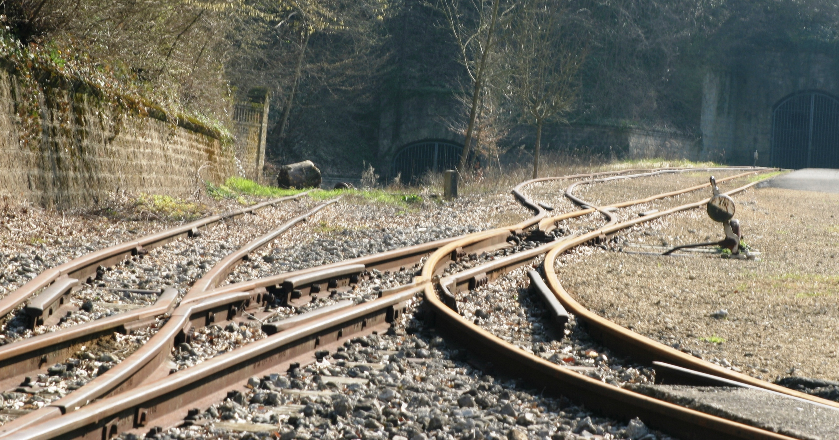 Weiche vun enger Minièresbunn am Fond-de-Gras.